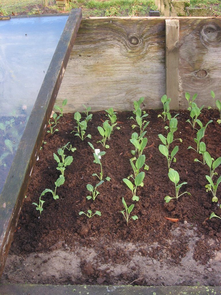 zelfgemaakte foto van weeuwenplanten bij bloemkool (rechts) en broccoli (links); half december